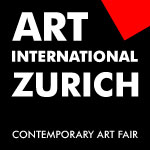 Logo von Art International Zürich